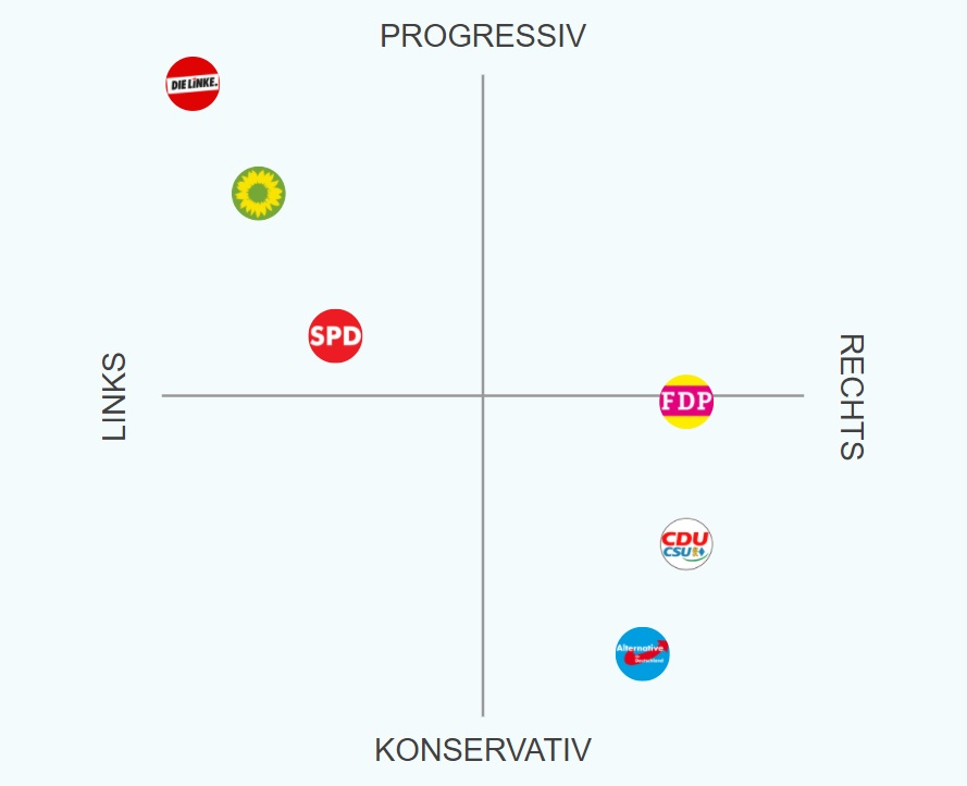 Diese politische Landschaft basiert auf den Berechnungen der Parteipositionen durch den Bundeswahlkompass 2017.